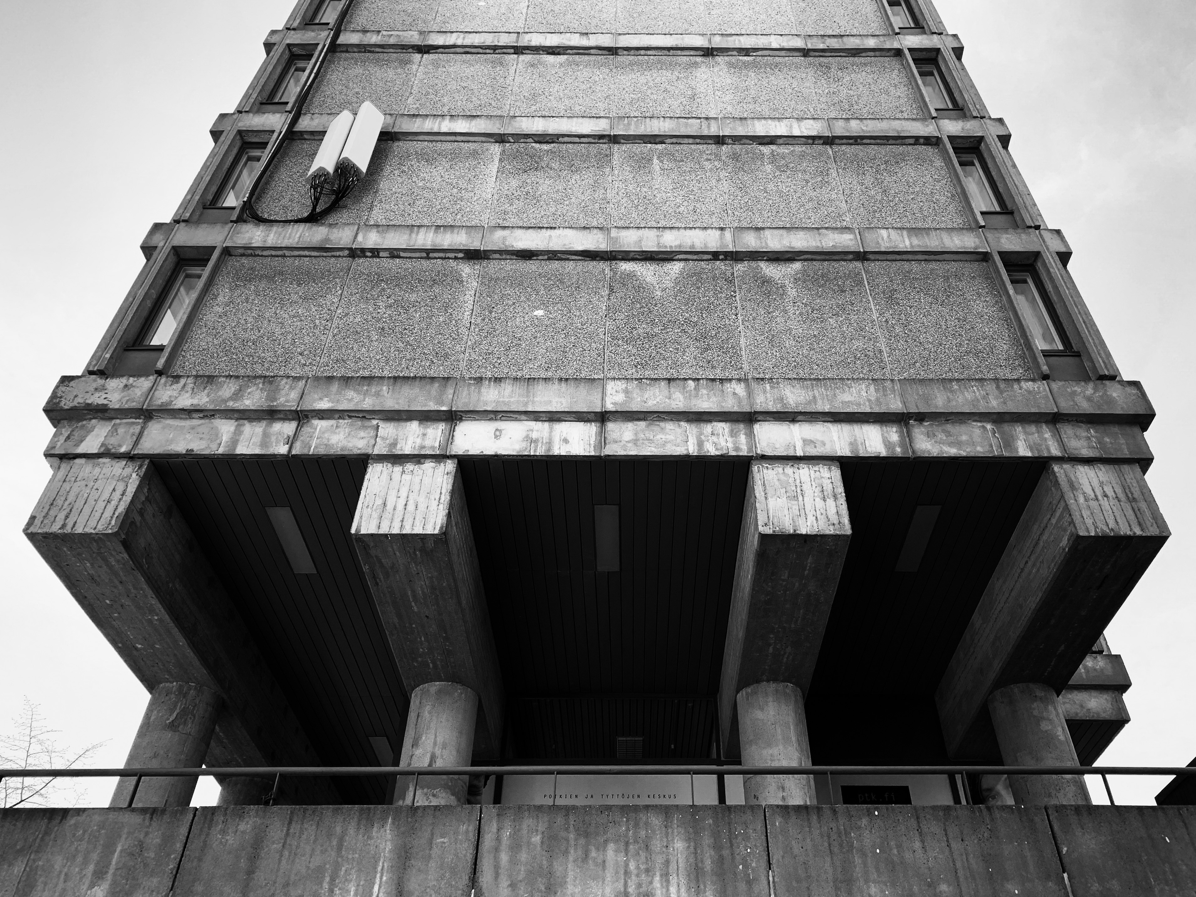 Asemapäällikönhovin asuinrakennuksen pohjoinen julkisivu, kuvattu kesällä 2019. Kuvatussa julkisivussa esiintyy sileitä betonielementti pintoja, pesubetoni pintoja ja valubetoni pintoja. Valubetoni pinnoissa näkee valumuotin laudoituksen kuvioa.